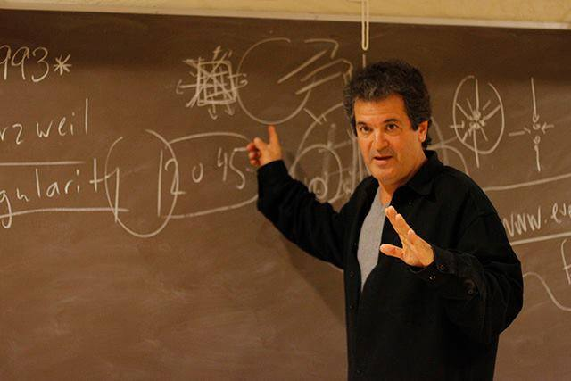 ד״ר בן-אהרן בהרצאה